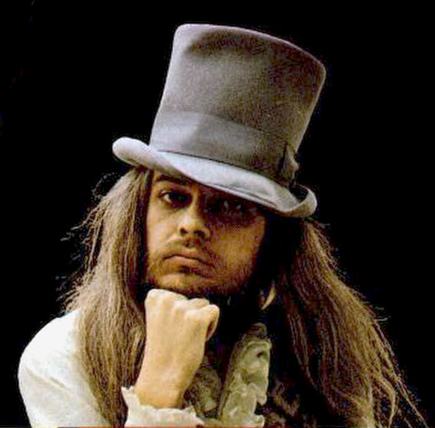 Leon Russell